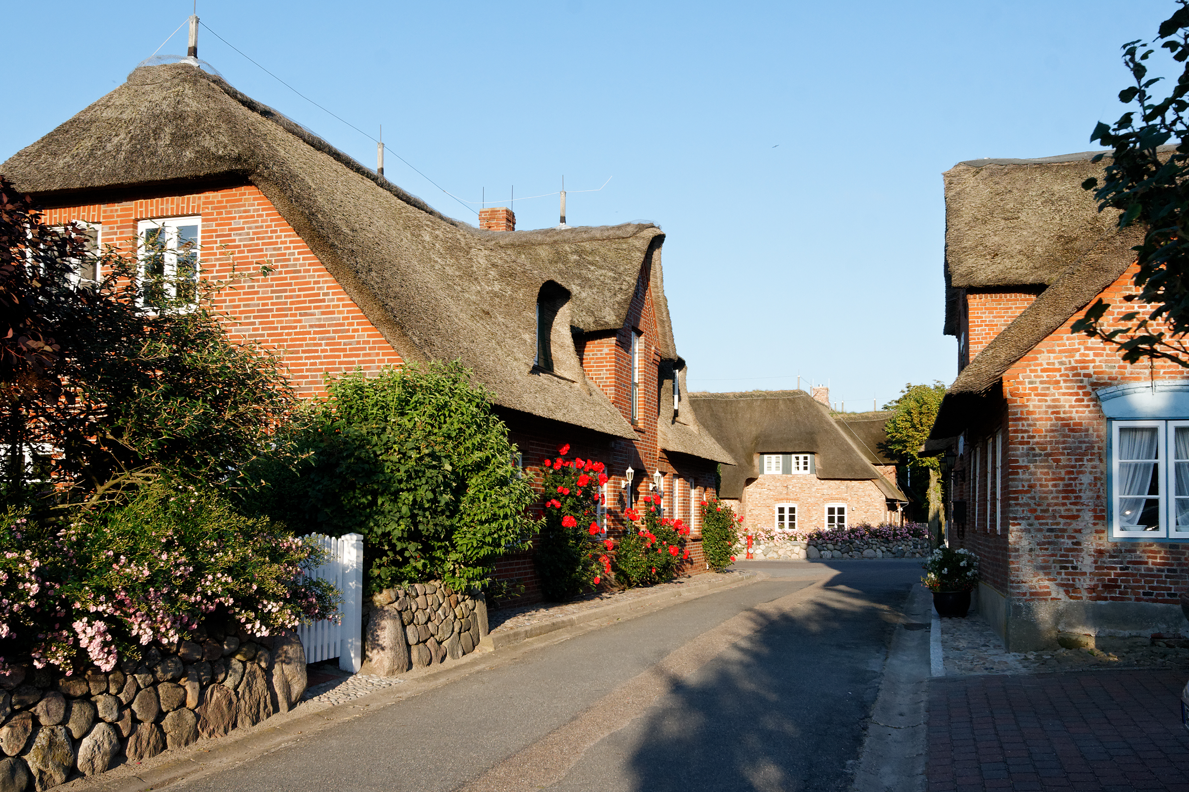 Friesenhäuser in Oldsum, Insel Föhr.